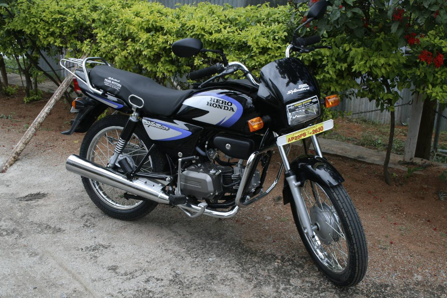 Hero Honda Splendor